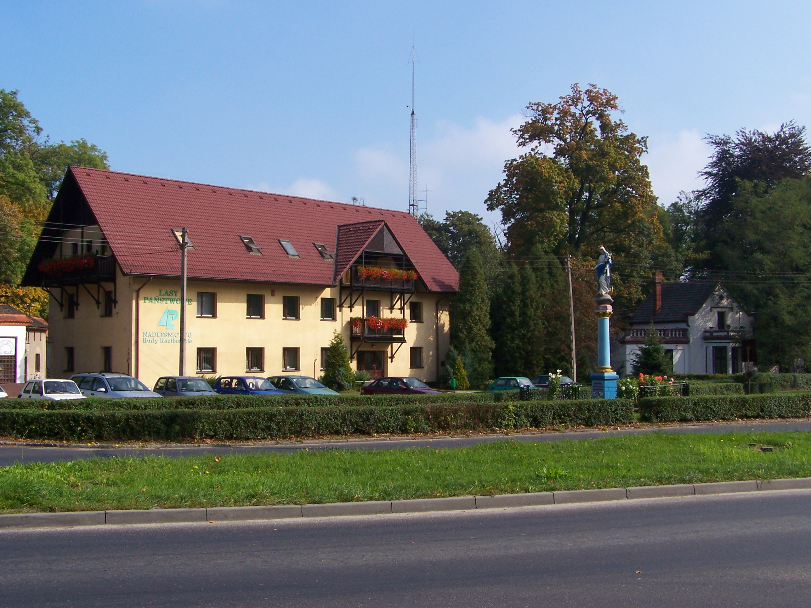 Budynek Lasów Państwowych i zabytkowa willa w Rudach Wielkich (Raciborskich).